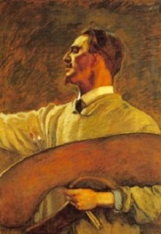 Autoritratto, olio su cartone, coll. privata